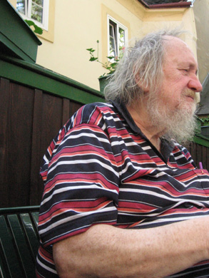 Rolf Schwendter 2007. Rolf las offensichtlich im von ihm langjährig geliebten Innenhof des "Weinhaus Sittl", Wien.